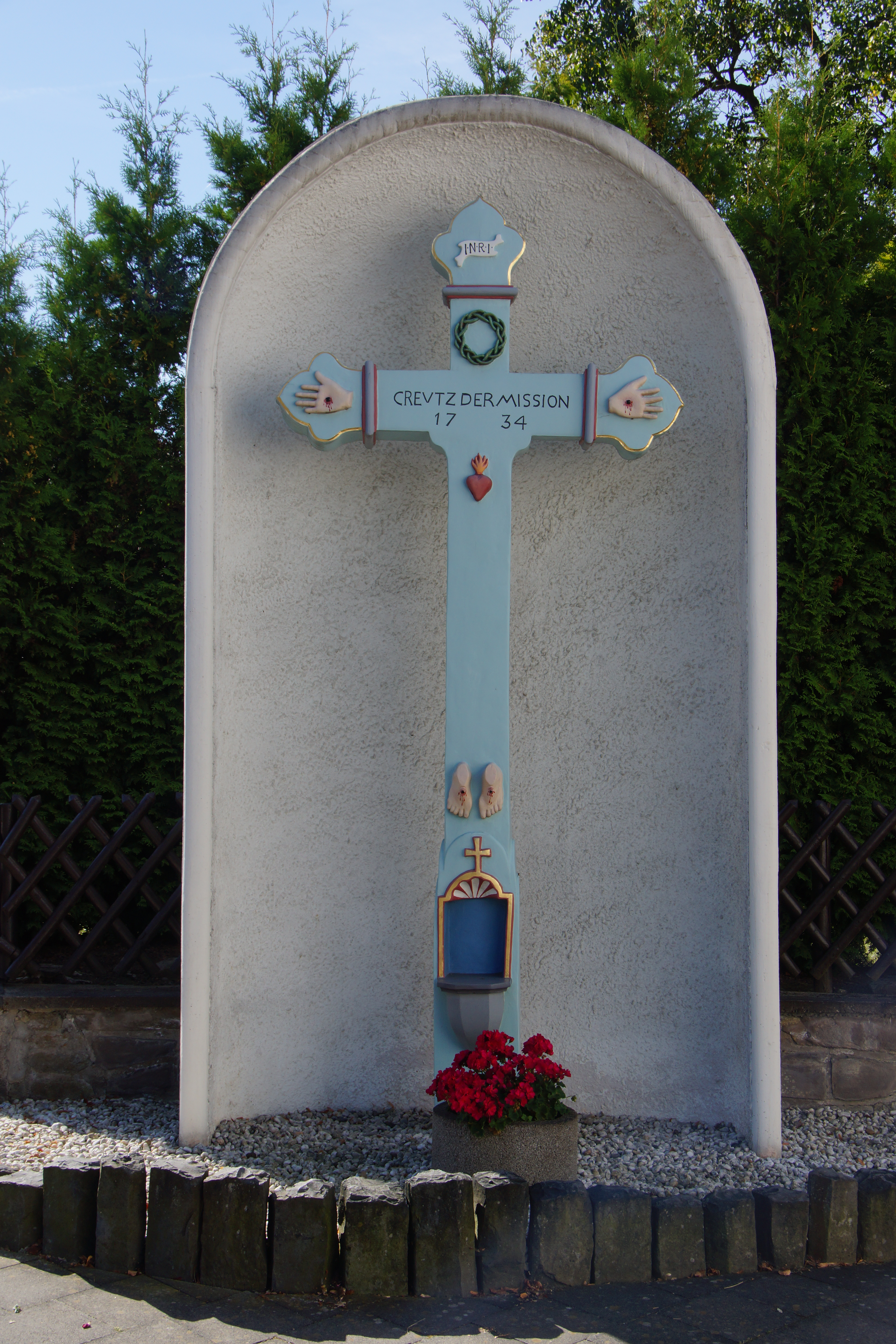 Denkmalgeschütztes Wegekreuz in Berghausen, Ecke Goldbergweg/Berghausener Straße, Königswinter